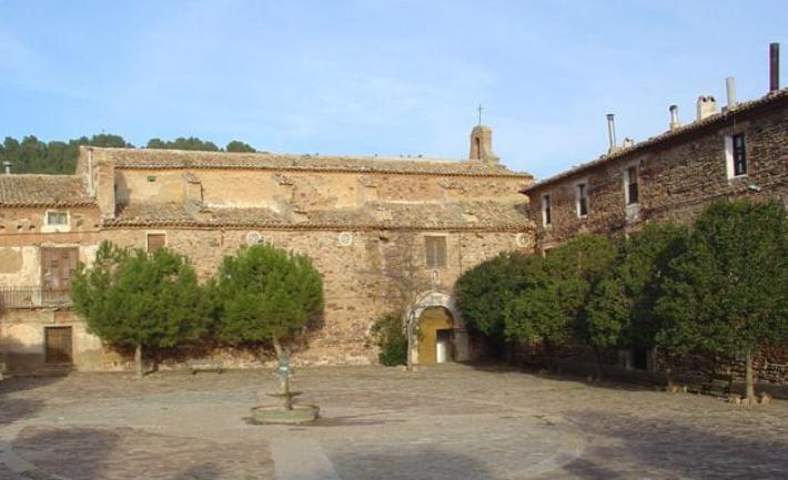 Plaza del Santuario de Rodanas donde al fondo se ve la iglesia y al lado la casa/cocina del parróco. A la derecha se ven las entradas a las cocinas.